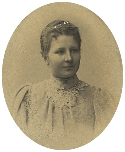 Antonia Pilars de Pilar